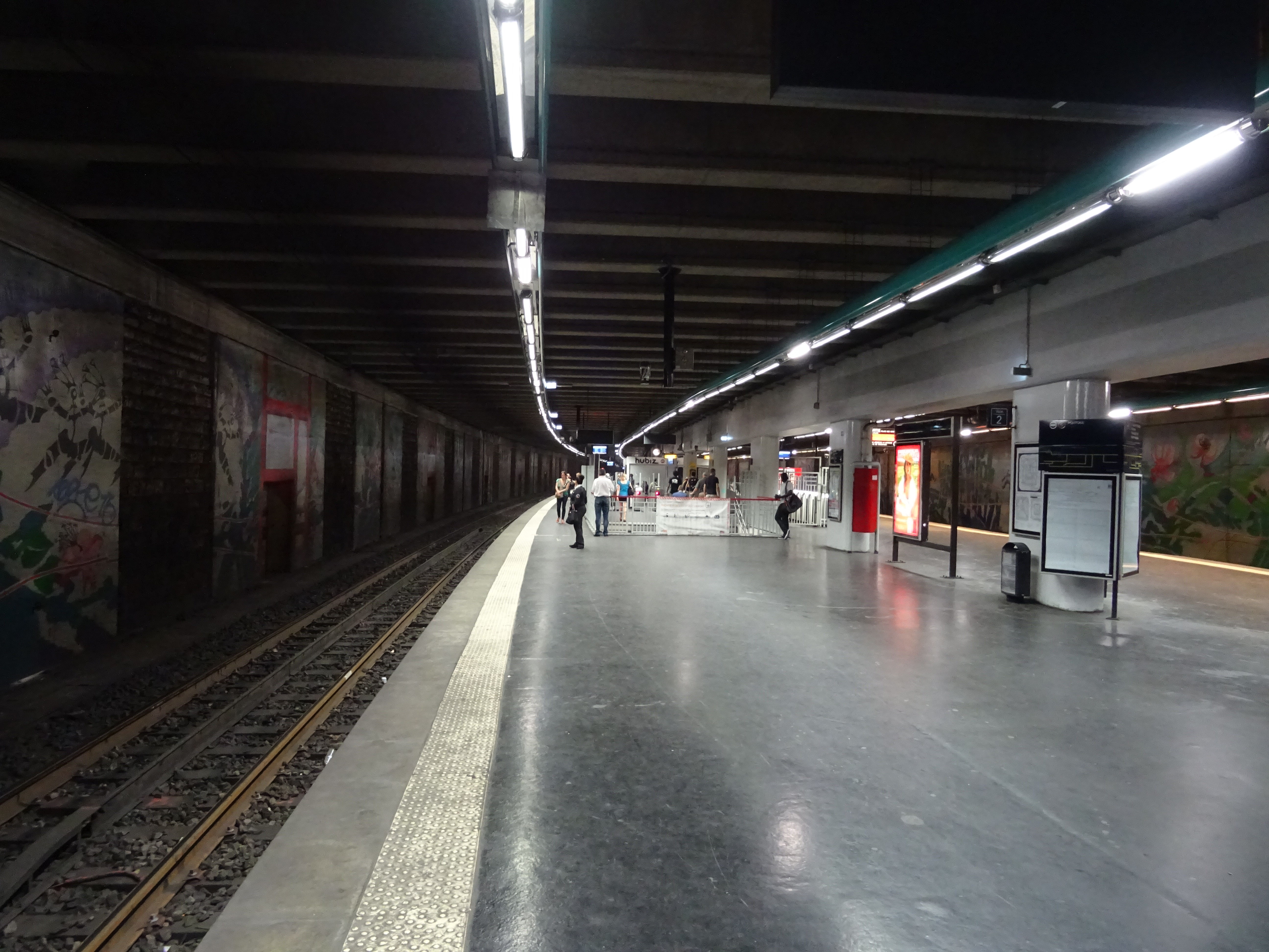 Quai gare Neuilly-Porte Maillot